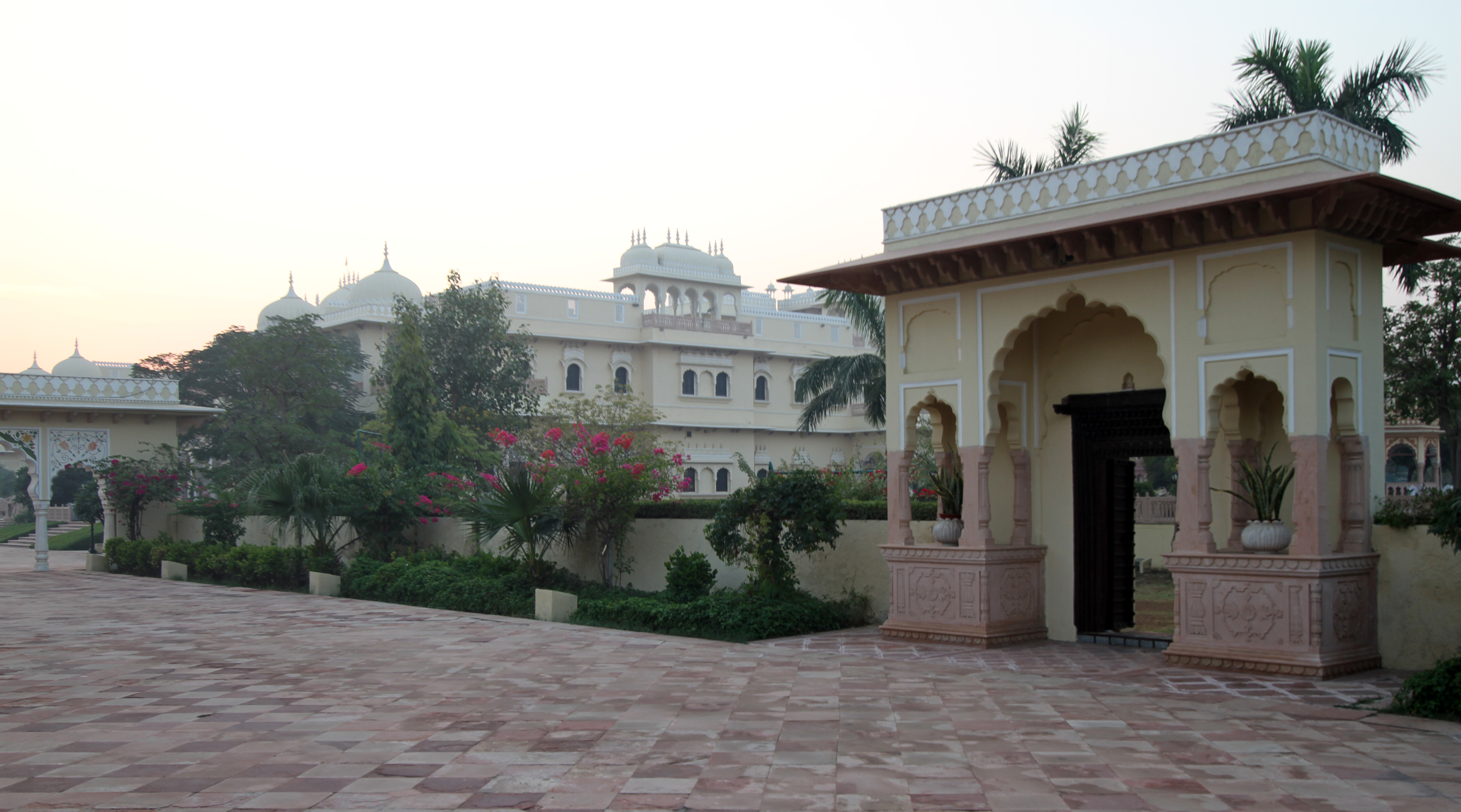 Laxmi Vilas Palace (Bharatpur)